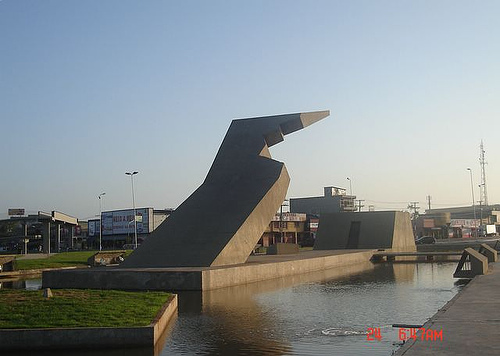 Memorial da Cabanagem foi inaugurado em 7 de janeiro de 1985, marcando as comemorações dos 150 anos do movimento que ocorreu na então província do Grão-Pará, durante a época imperial no Brasil. O monumento, projetado pelo arquiteto Oscar Niemayer e executado pela Secretaria de Estado de Viação e Obras Públicas, tendo a frente o engenheiro Manoel Acácio, foi constituído em estrutura de concreto armado, em um período de quatro meses.